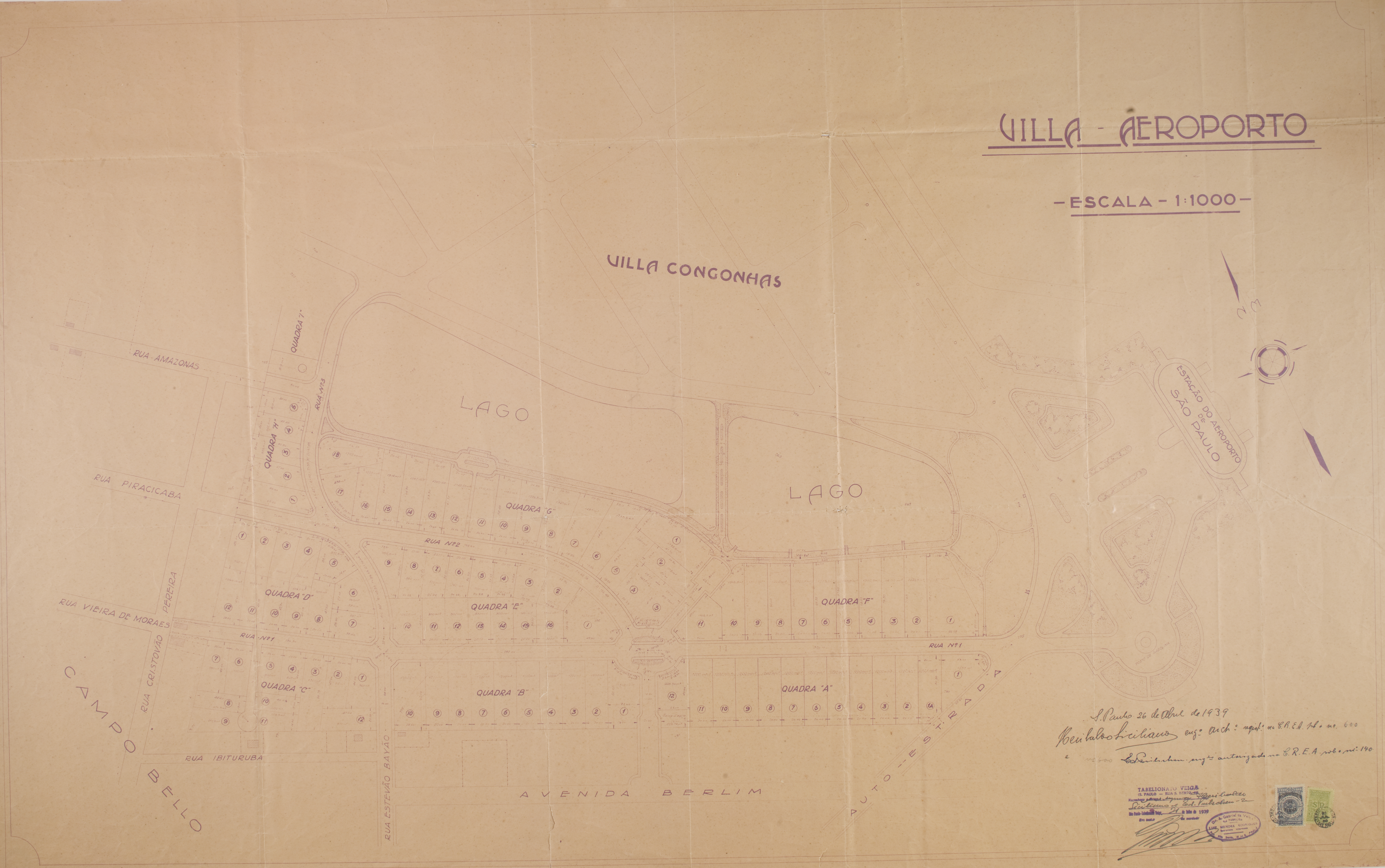 Obra que integra o acervo do Museu Paulista da USP. Coleção João Baptista de Campos Aguirra - Ref. Agente: Tabelionato Veiga (São Paulo - Rua São Bento 41). Condomínio Villa Aeroporto, situado a rua Líbero Badaró, 293 - São Paulo